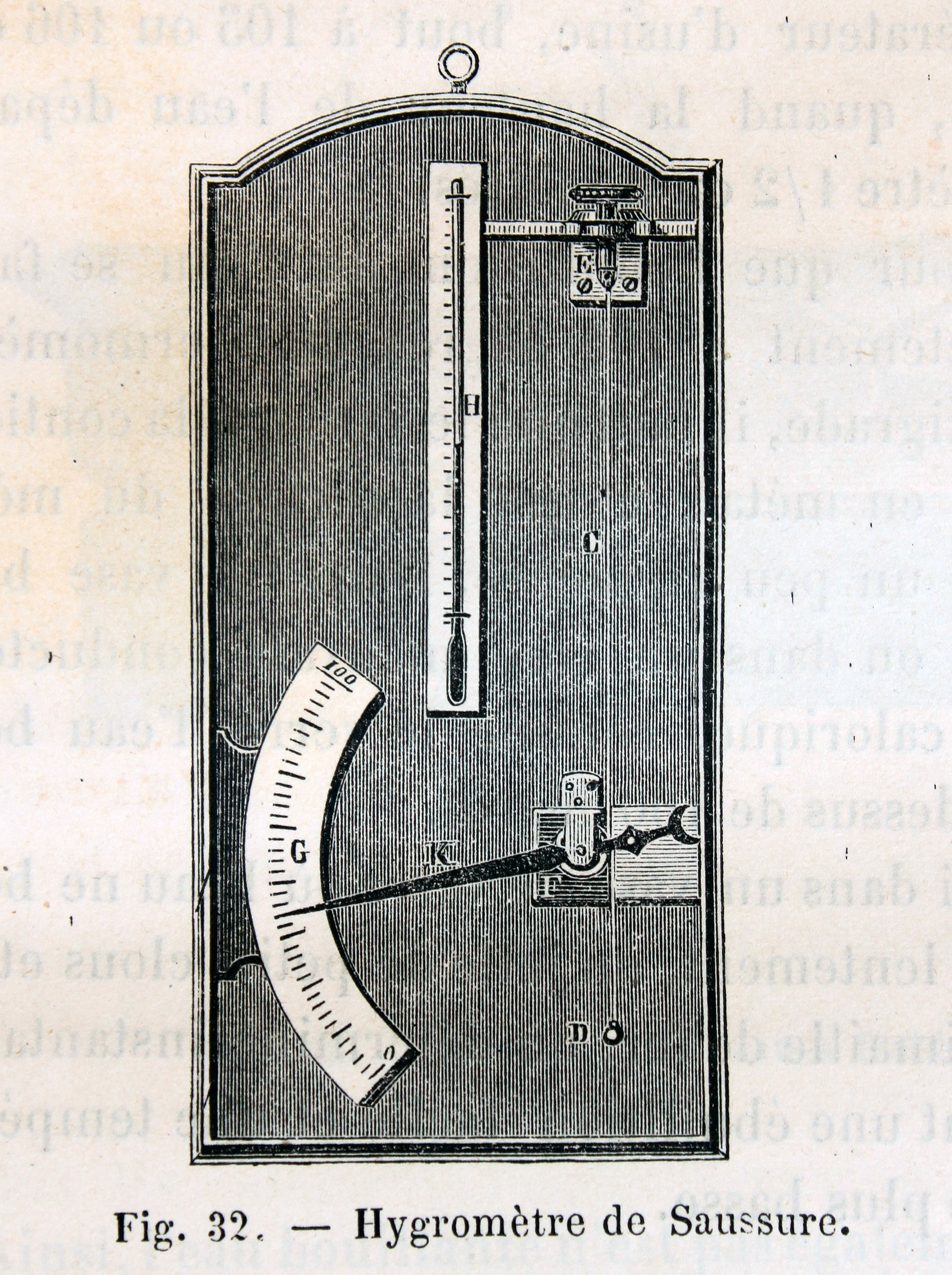 Ilustraciones de la obra : Les merveilles de l'industrie ou, Description des principales industries modernes / par Louis Figuier. - Paris : Furne, Jouvet, [1873-1877]. - Tome III